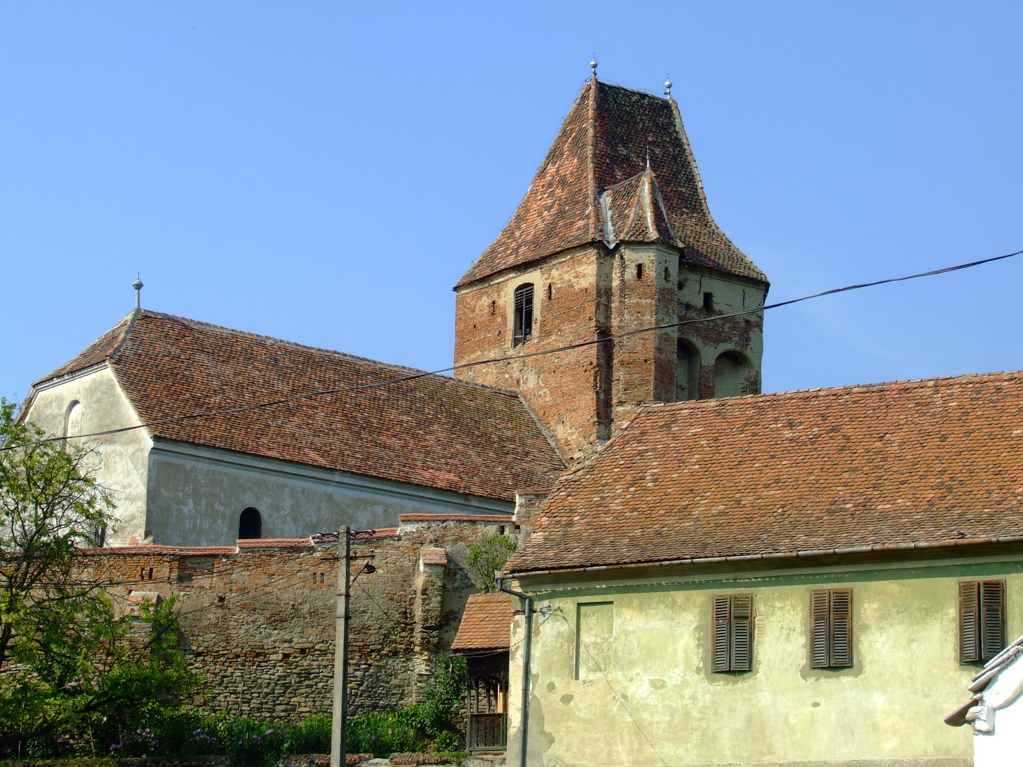 Biserica evanghelică fortificată 01